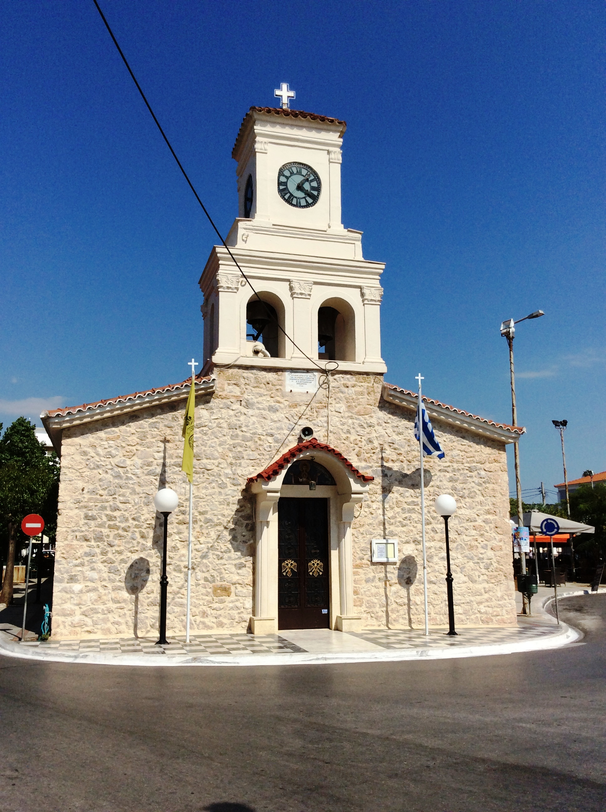 Γαργαλιάνοι Μεσσηνίας. Ο Ιερός Ναός Γεννήσεως της Θεοτόκου (Γεννέσιον της Θεοτόκου ή Γενέθλιον της Θεοτόκου) στους Γαργαλιάνους.